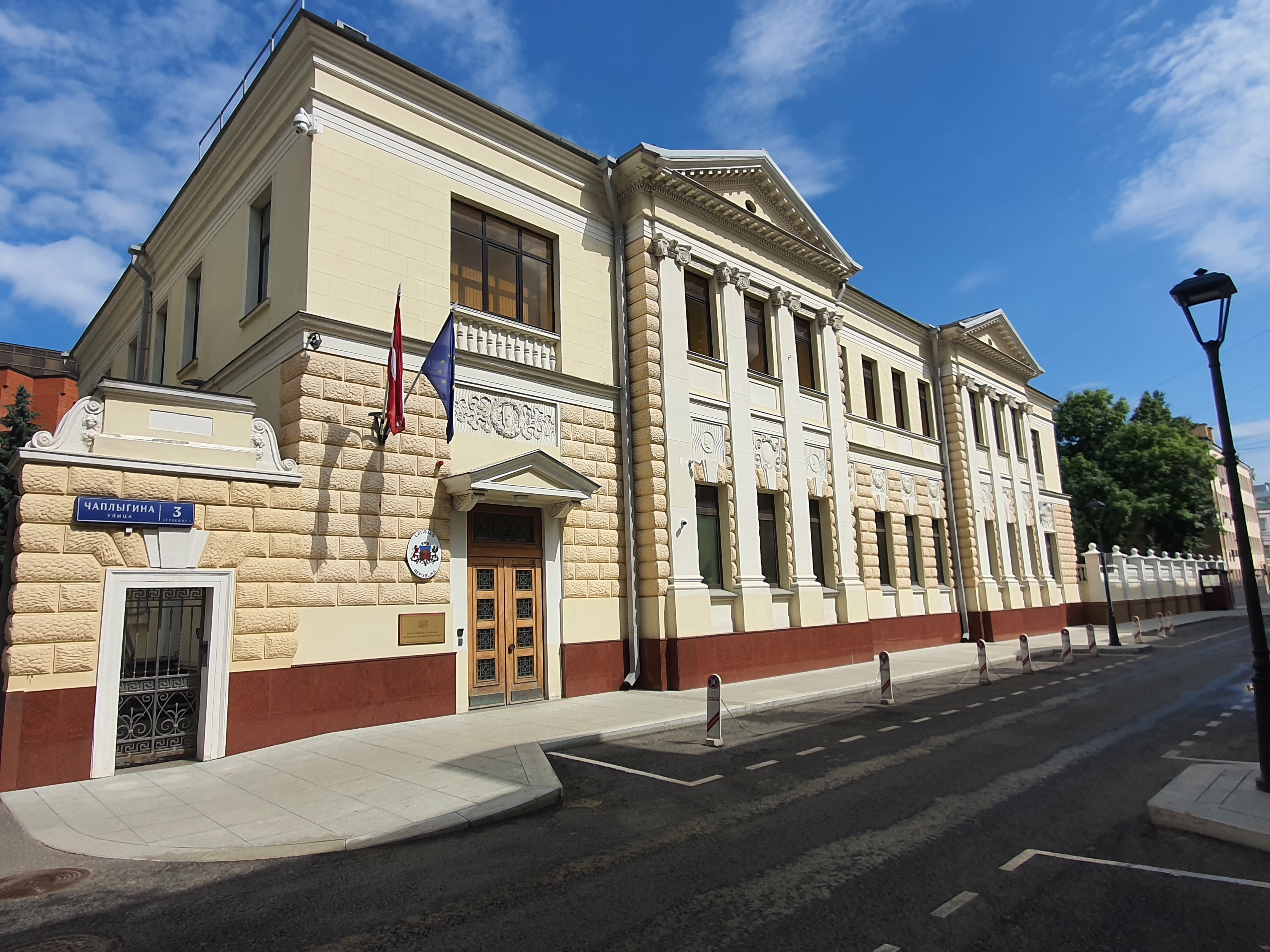 Latvijas vēstniecības Krievijā ēka 2020.gada jūlijs